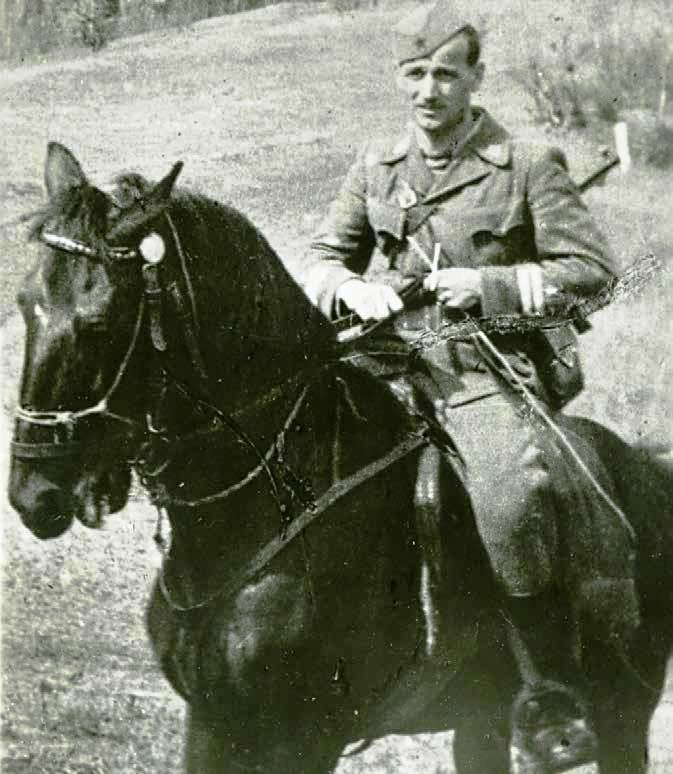 Franc Poglajen – Kranjc, v času osvobajanja Zgornje Savinjske doline komandant Četrte operativne cone.